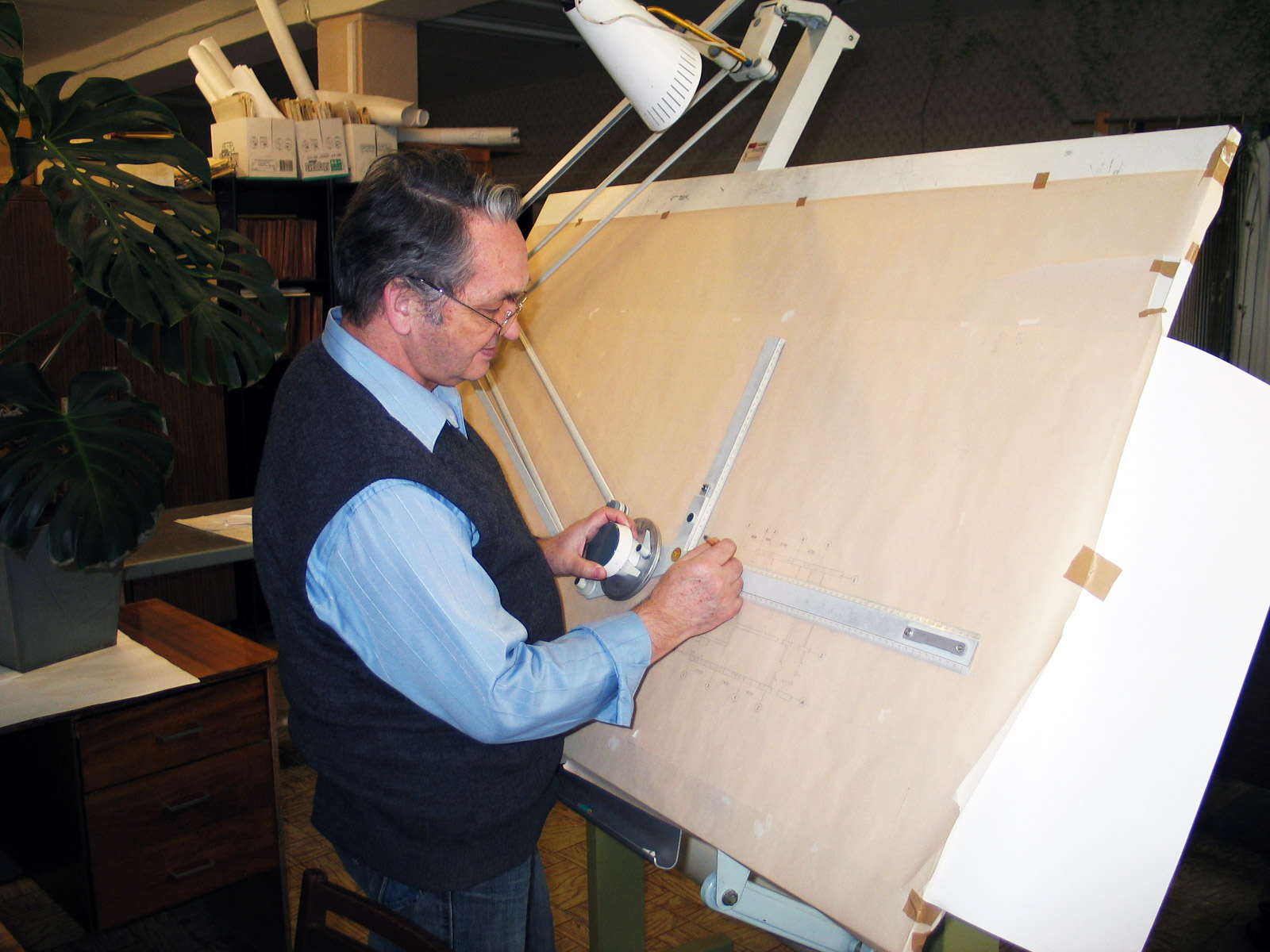 Кульман (чертежный инструмент), german drawing board